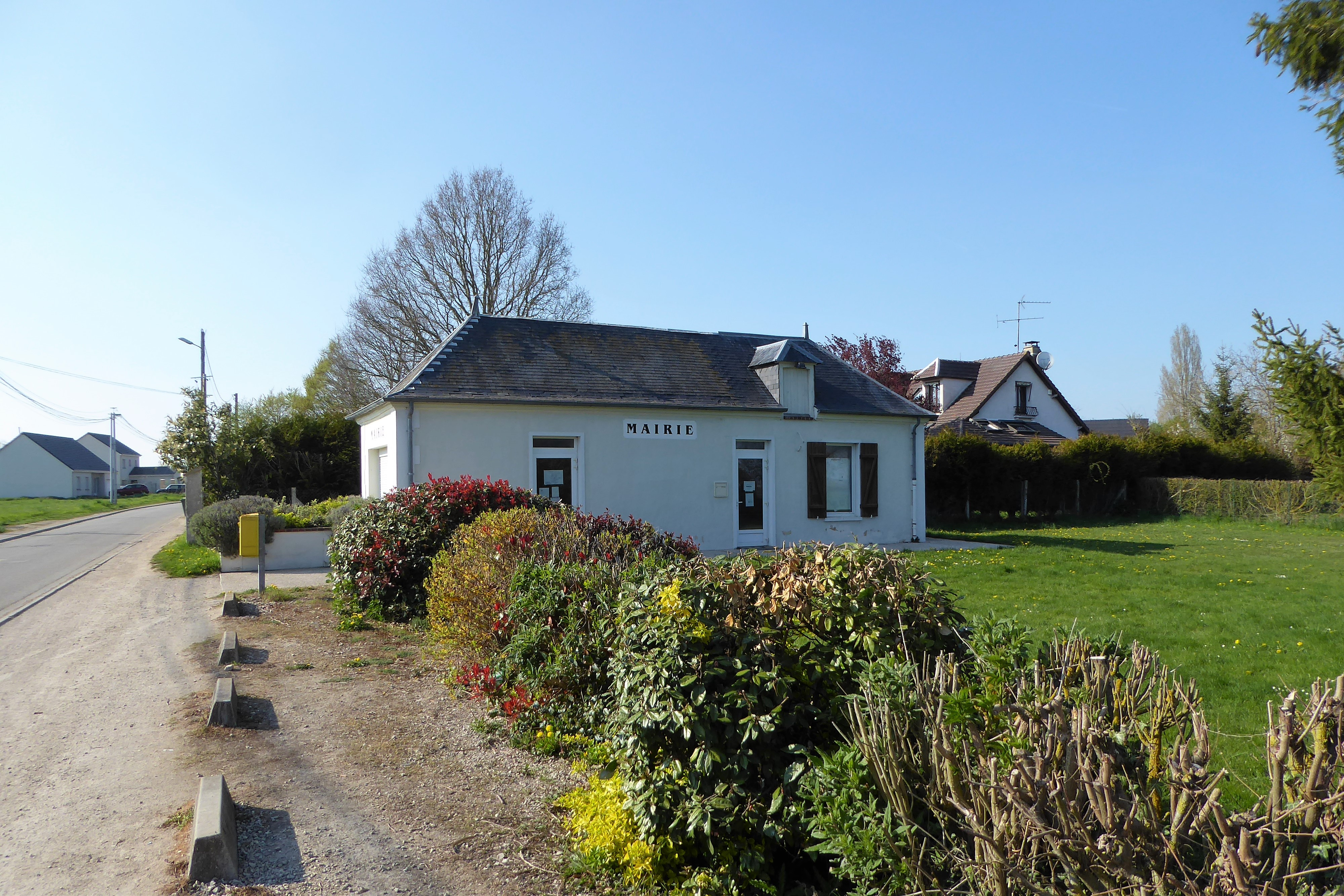 mairie de la commune déléguée Champagne, Goussainville, Eure-et-Loir, France.